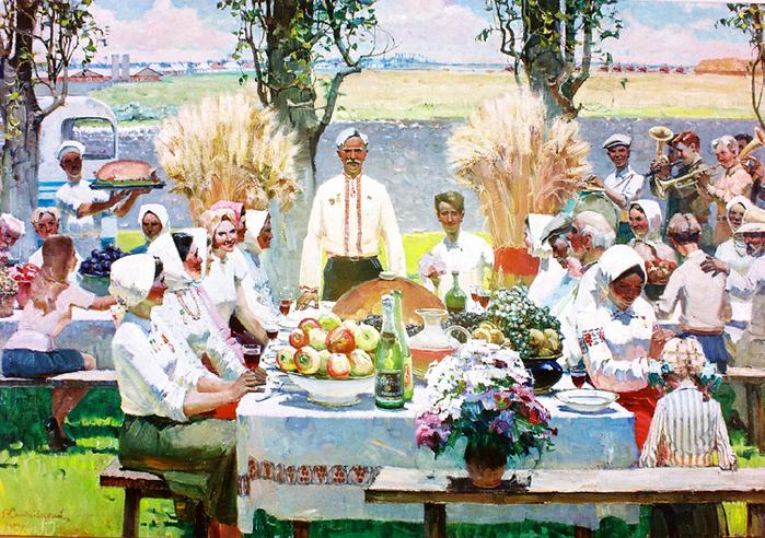 С урожаем